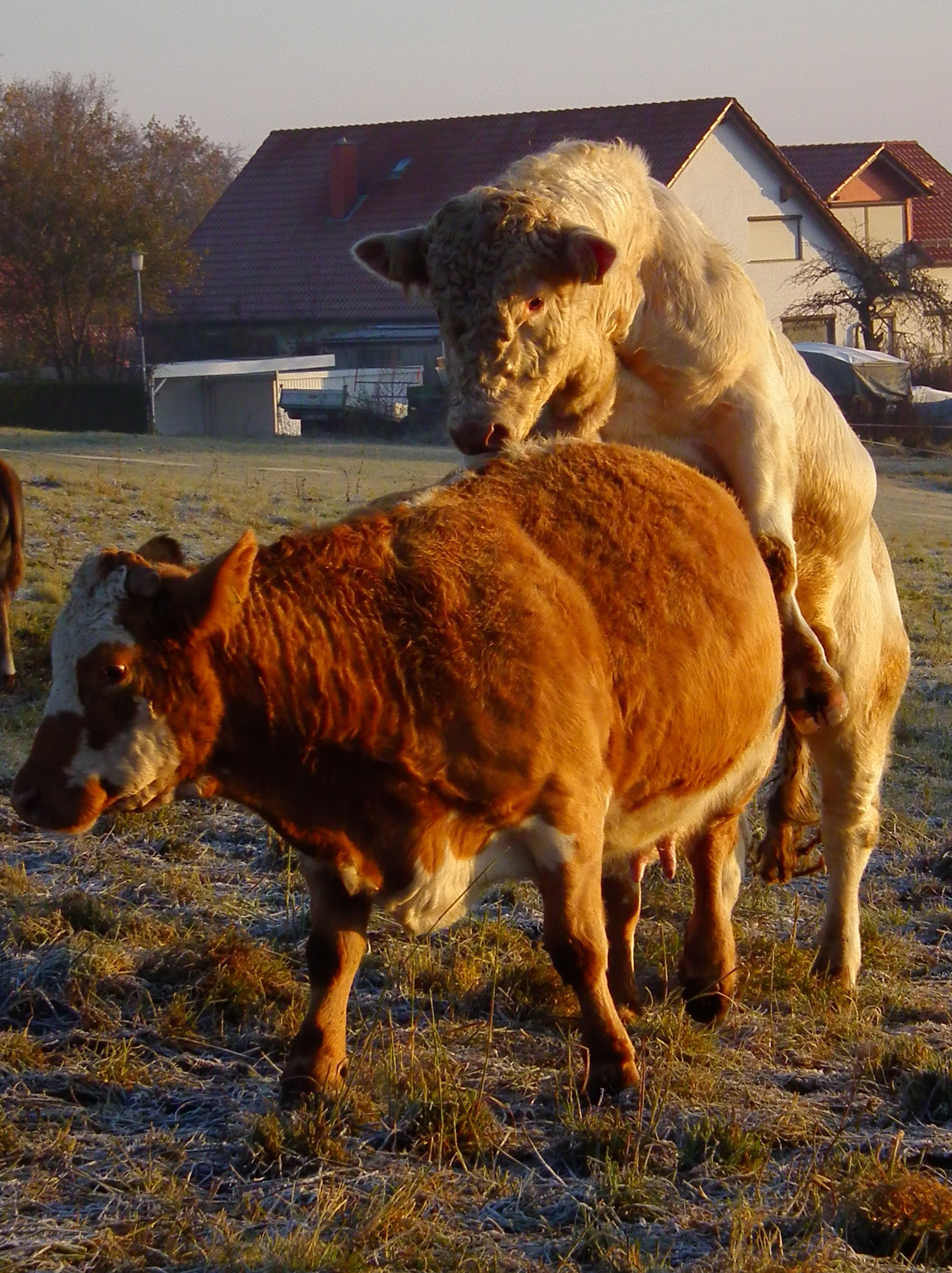 Aufreitender Stier